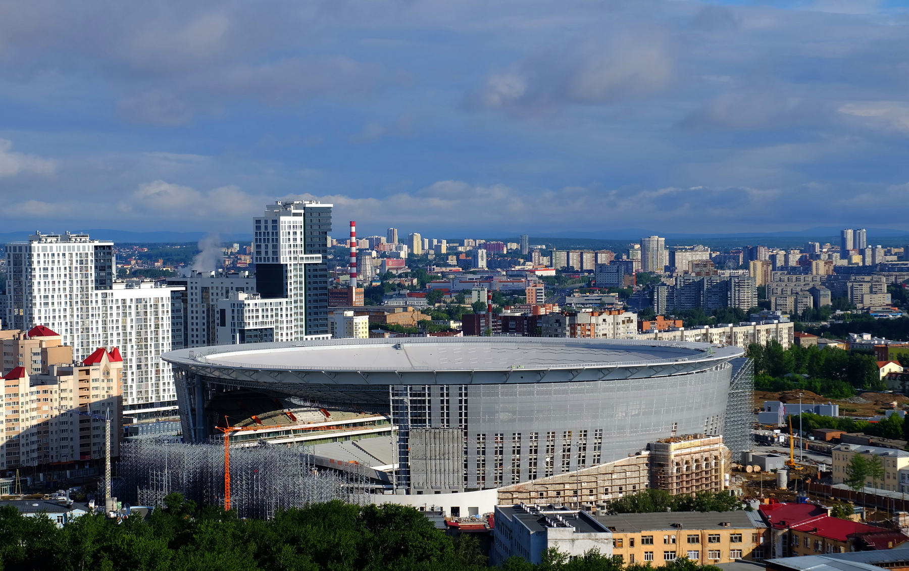 Центральный стадион (на время ЧМ-2018 - "Екатеринбург-арена") в Екатеринбурге, июль 2017 (реконструкция)